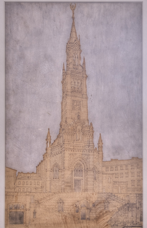 Obilježavanje 400. obljetnice dolaska kapucina u Hrvatsku, odnosno osnivanja prvoga samostana kapucinskoga reda u Rijeci 1610. godine.